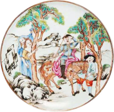 Companhia das Índias.